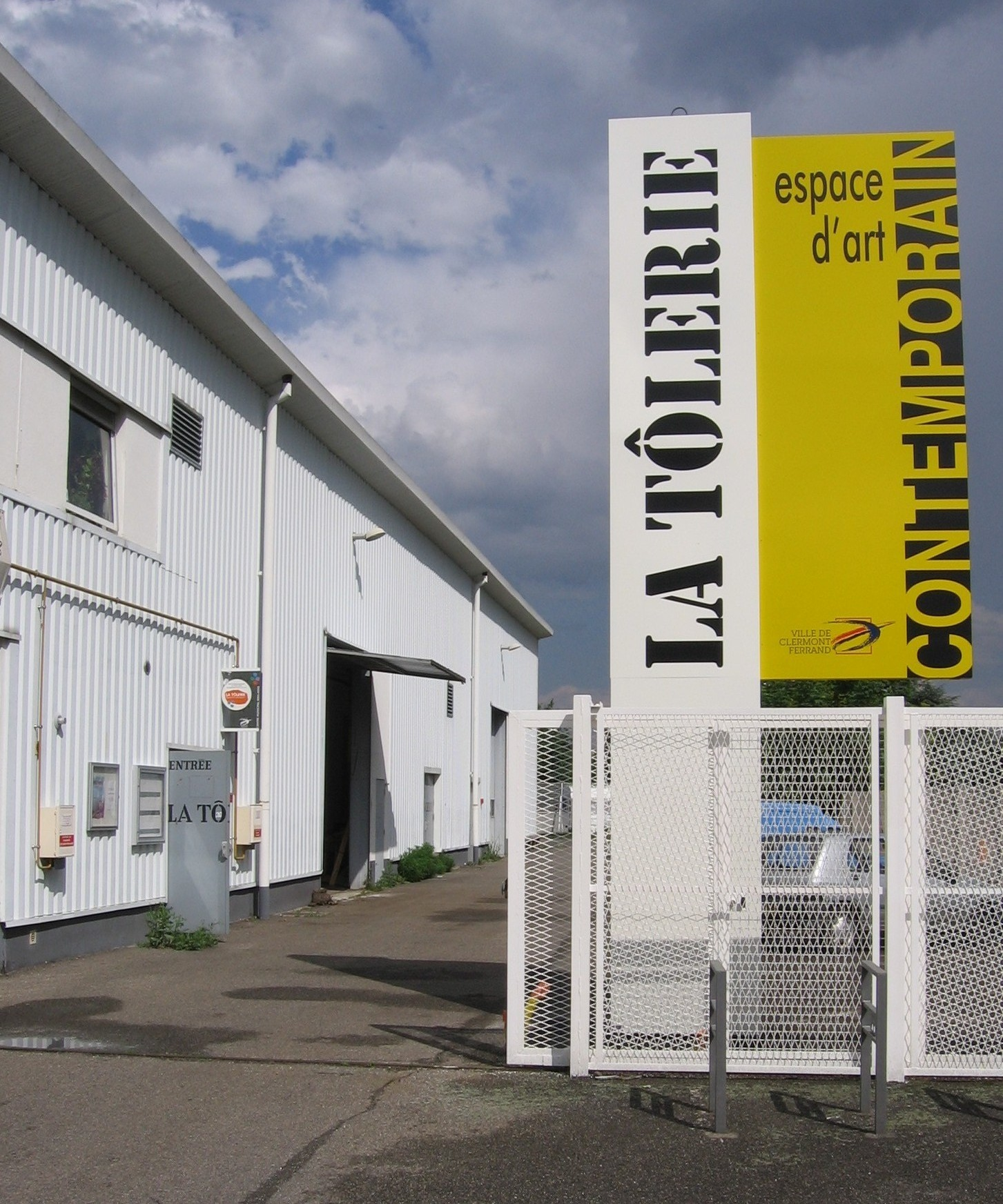 Vue extérieure de La Tôlerie